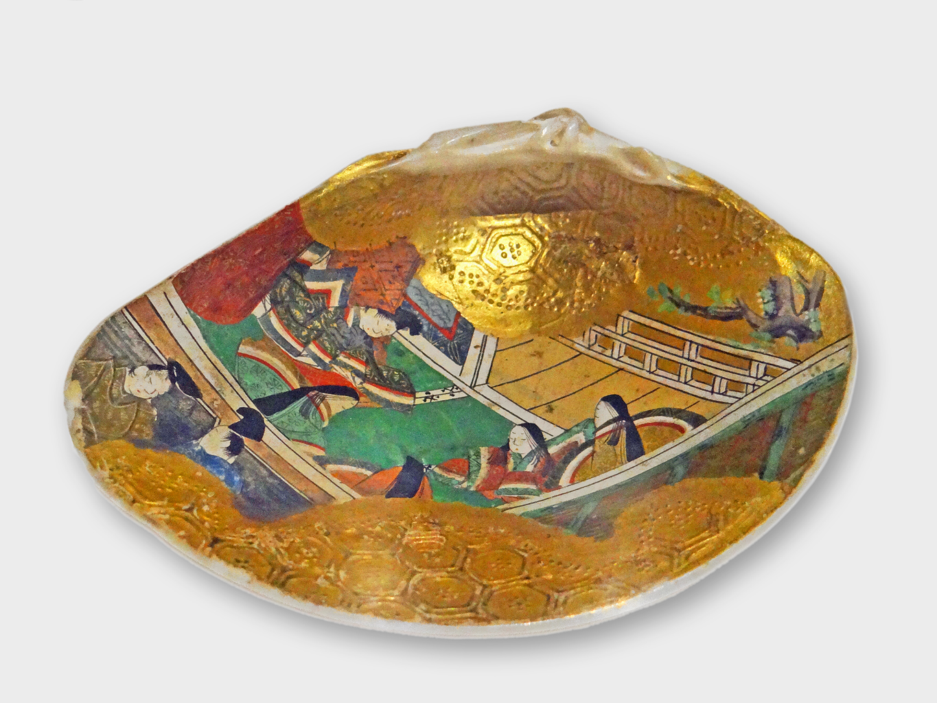 Kai, coquillage peint pour le jeu de Kai-Awase fin du XVIIè siècle coquille, couleurs et feuille d'or Kai-Awase est un jeu familial traditionnel japonais dans lequel il s’agit de reconstituer des paires de coquillages dont l’intérieur a été peint. C’était une activité ludique appréciée initialement par les membres de la cour impériale mais qui s'est popularisée par la suite. Objet de la collection du musée d'art oriental de Venise, présentée dans l'exposition Hiroshige. De Edo à Kyoto vues célèbres du Japon, au palais Grimani du 20 septembre 2014 au 15 janvier 2015 Cette exposition très bien scénographiée dans les salles du palazzo Grimani permet de voir de nombreuses oeuvres (estampes) de Hiroshige appartenant aux collections du musée d'art oriental de Venise. Ce musée, dont le fond japonais est très riche, se trouve hébergé depuis de nombreuses années dans des locaux trop exigus au 3ème étage du palais Ca' Pesaro, le musée d'art moderne de Venise. Sa réinstallation dans un palais plus vaste a été sans cesse repoussée, ce qui l'oblige à exposer ses collections dans d'autres musées. Album sur le musée d'art oriental (photos dalbera)